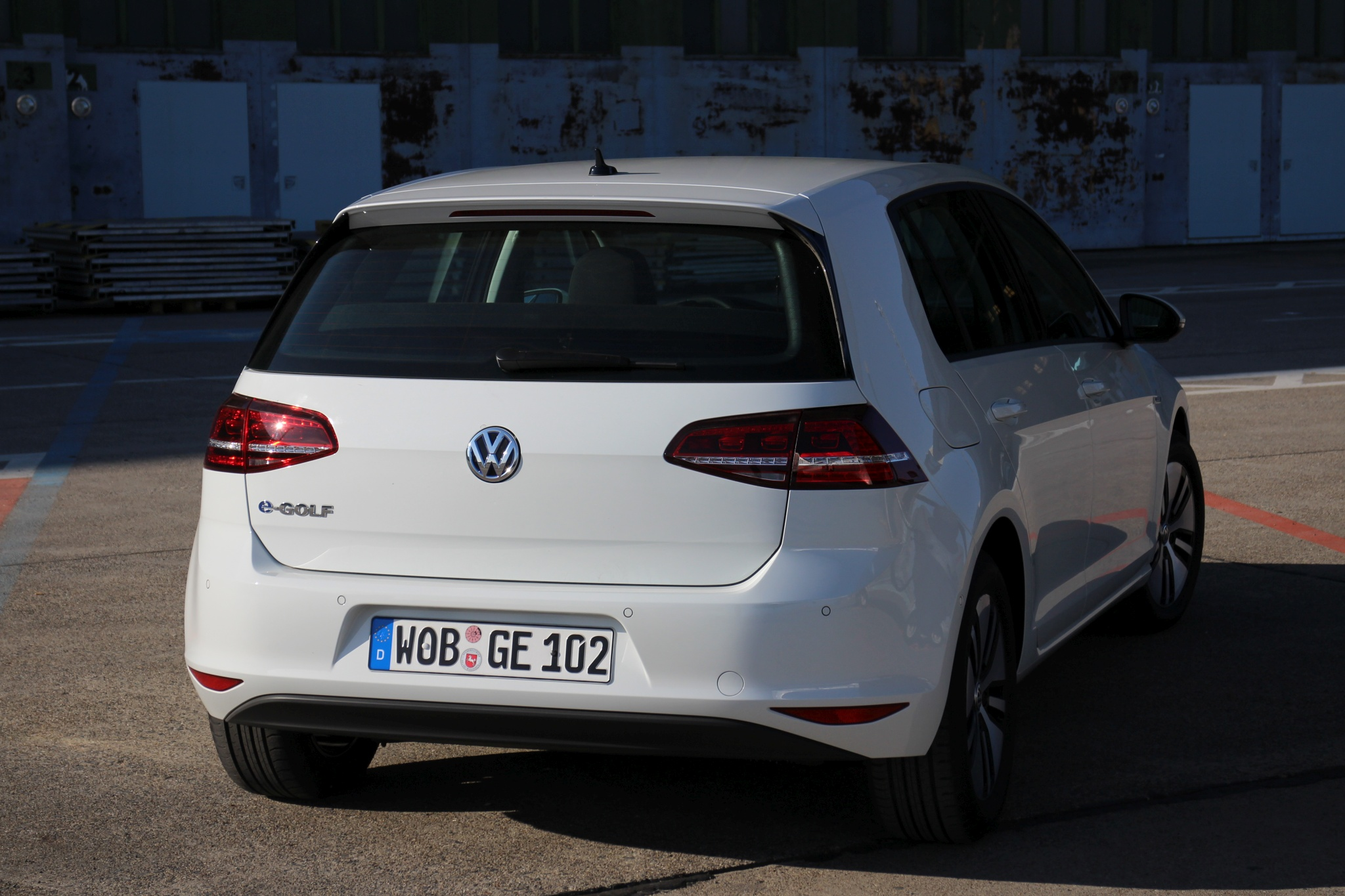 der neue, rein elektrisch angetriebene eGolf (auf Basis des Golf 7) Reichweite 130-190 km 3 Fahrmodi = Eco und Eco+, Normal 24 kWh Batterie Gewicht 318 kg 12,7 kWh/100 km Batterieposition: über Hinterachse Ladedauer: 20% auf 80% in ca. 30 Minuten beim Schnelllader und 3-4 Stunden bei Haushaltssteckdose 115 PS / 270 Nm Höchstgeschwindigkeit 140 km/h Kofferraumvolumen 341 -- 1.231 Liter Preis: ab 35.000 Euro